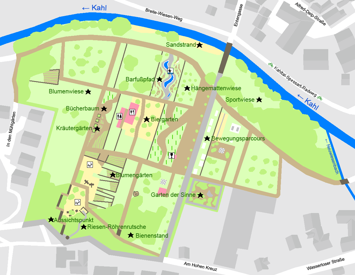 Karte des Generationenparks in Alzenau Gebäude Baum Wiese Wasser Sand Weingarten Sehenswürdigkeit Gastronomie WC Weinstube Kneipp-Anlage Spielplatz